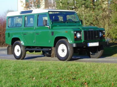 Land Rover Defender Station Wagon 110 TD 5, Baujahr 2004